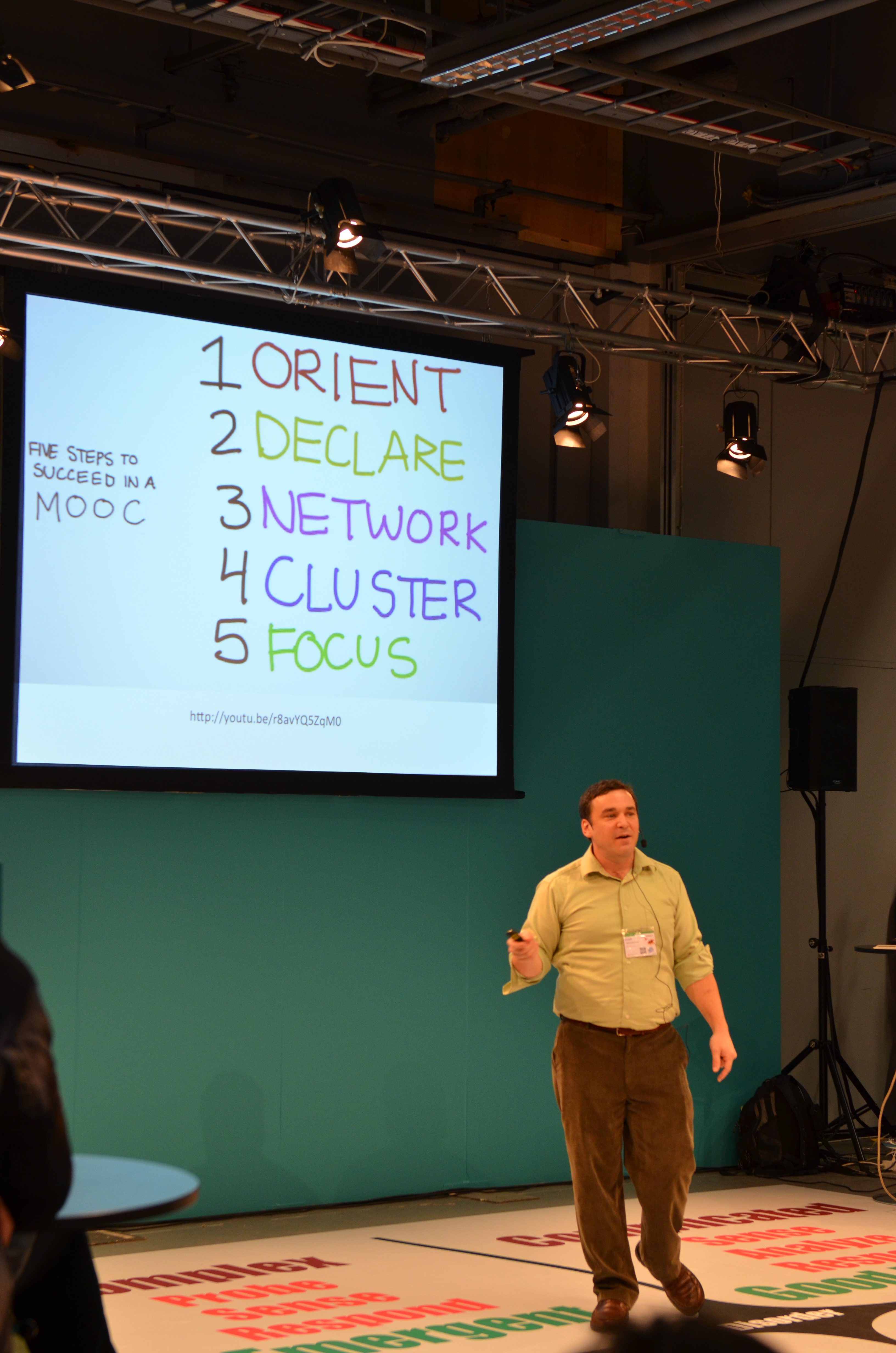 Dave Cormier pratar om MOOC på Skolforum i Stockholm 2012.